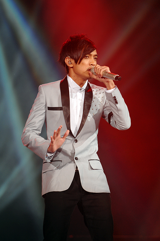 Rehearsal Anugerah Juara Lagu 24